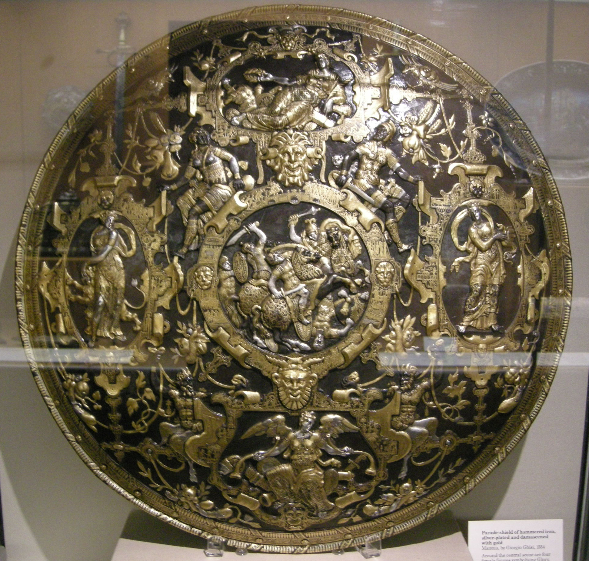 Giorgio ghisi, mantova, scudo da parata, 1554